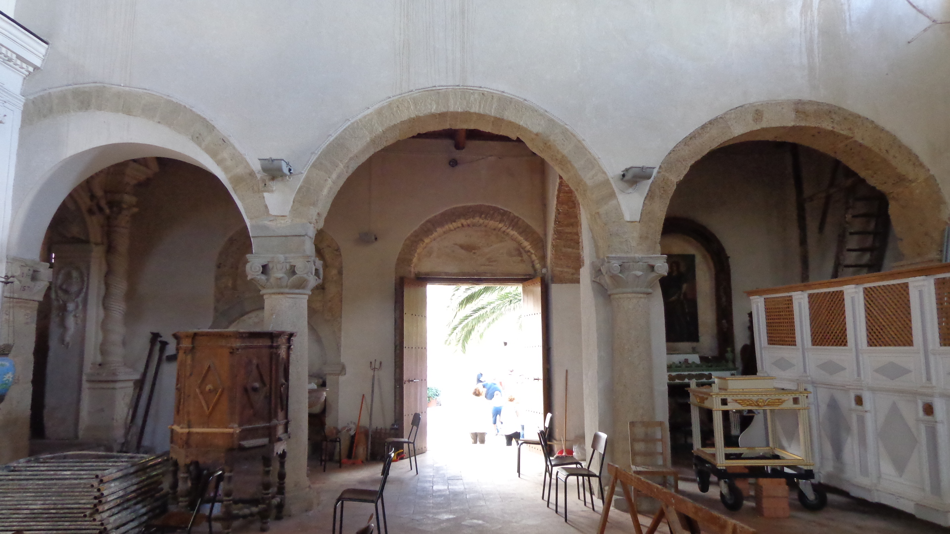 Navata destra